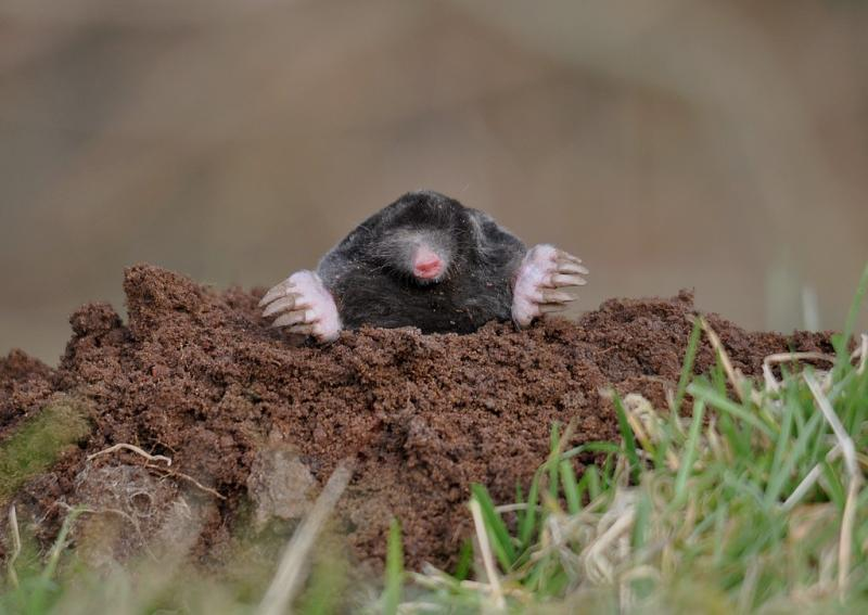 Uit de grond komende mol (Talpa europaea)